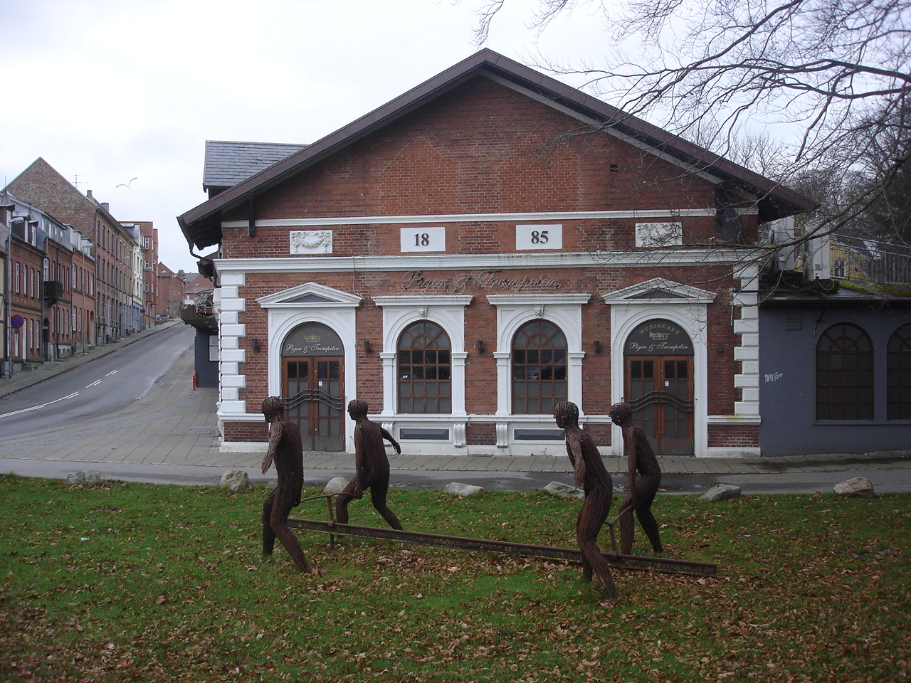 Jernbanerestaurationen ved Skive N set fra Ø - tv. Nordbanevej